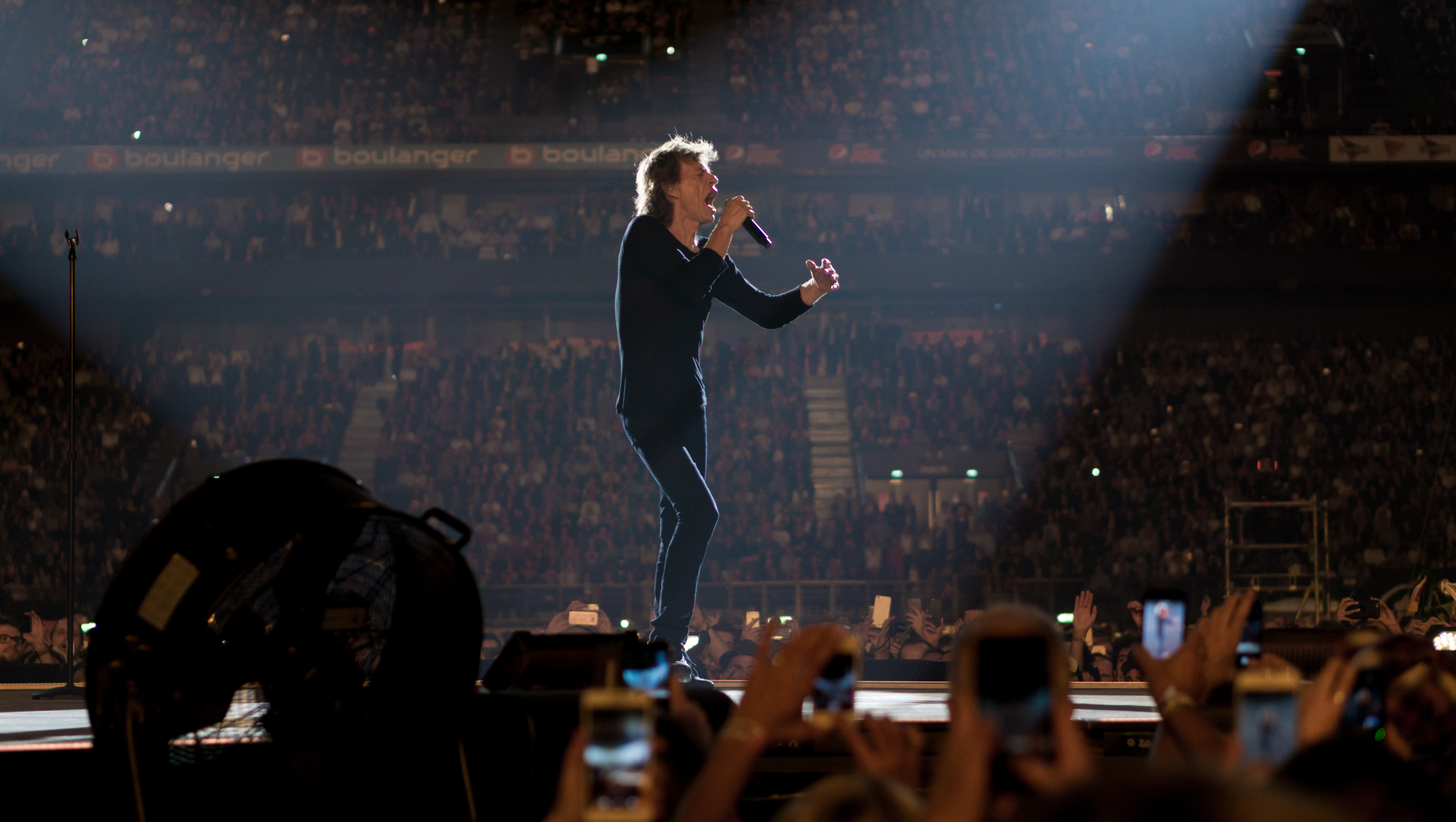 StonesUArena191017-63